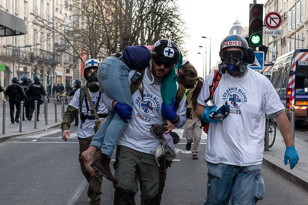 Les Gilets Jaunes